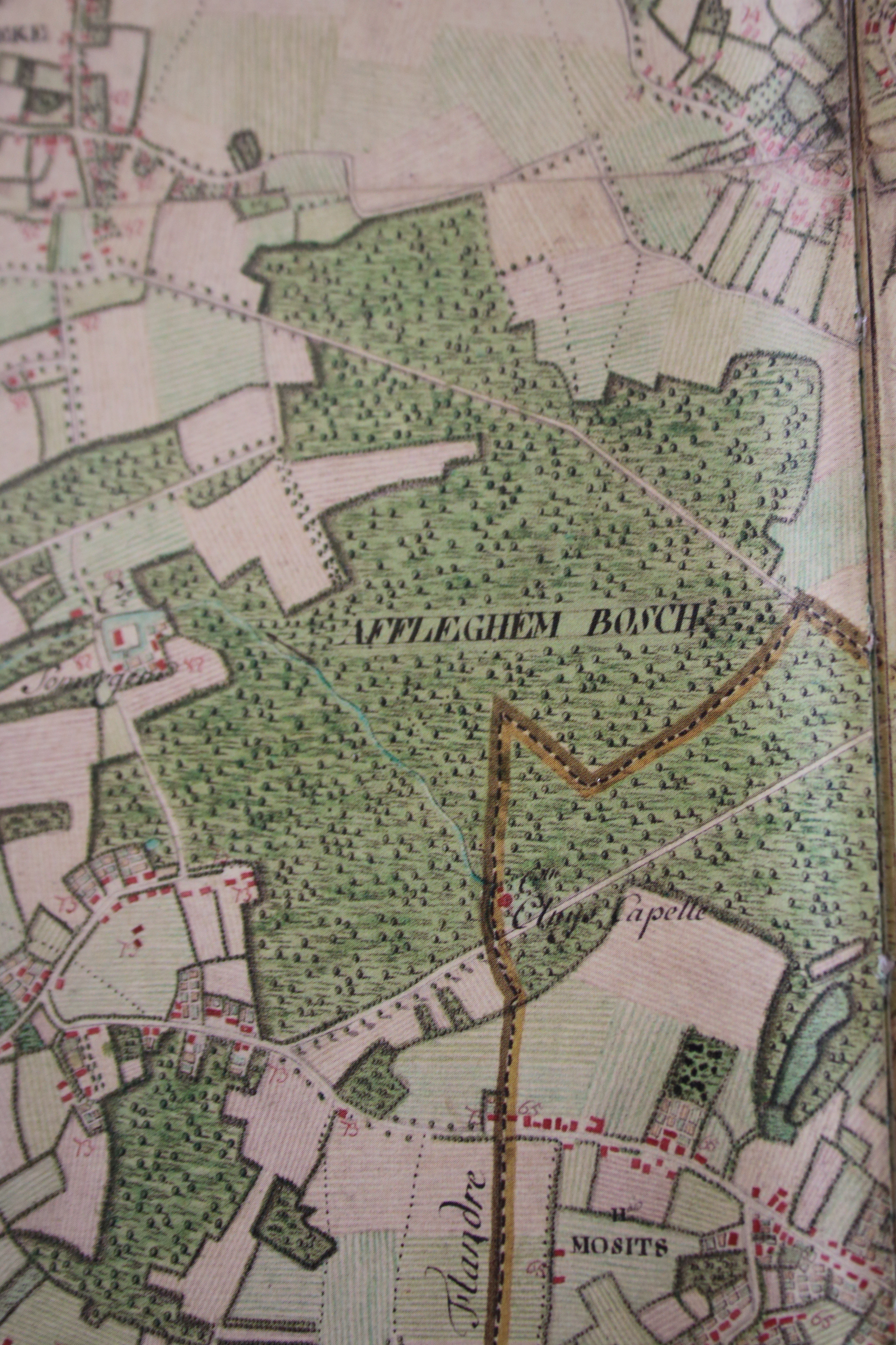 Kluizenbos Ferraris